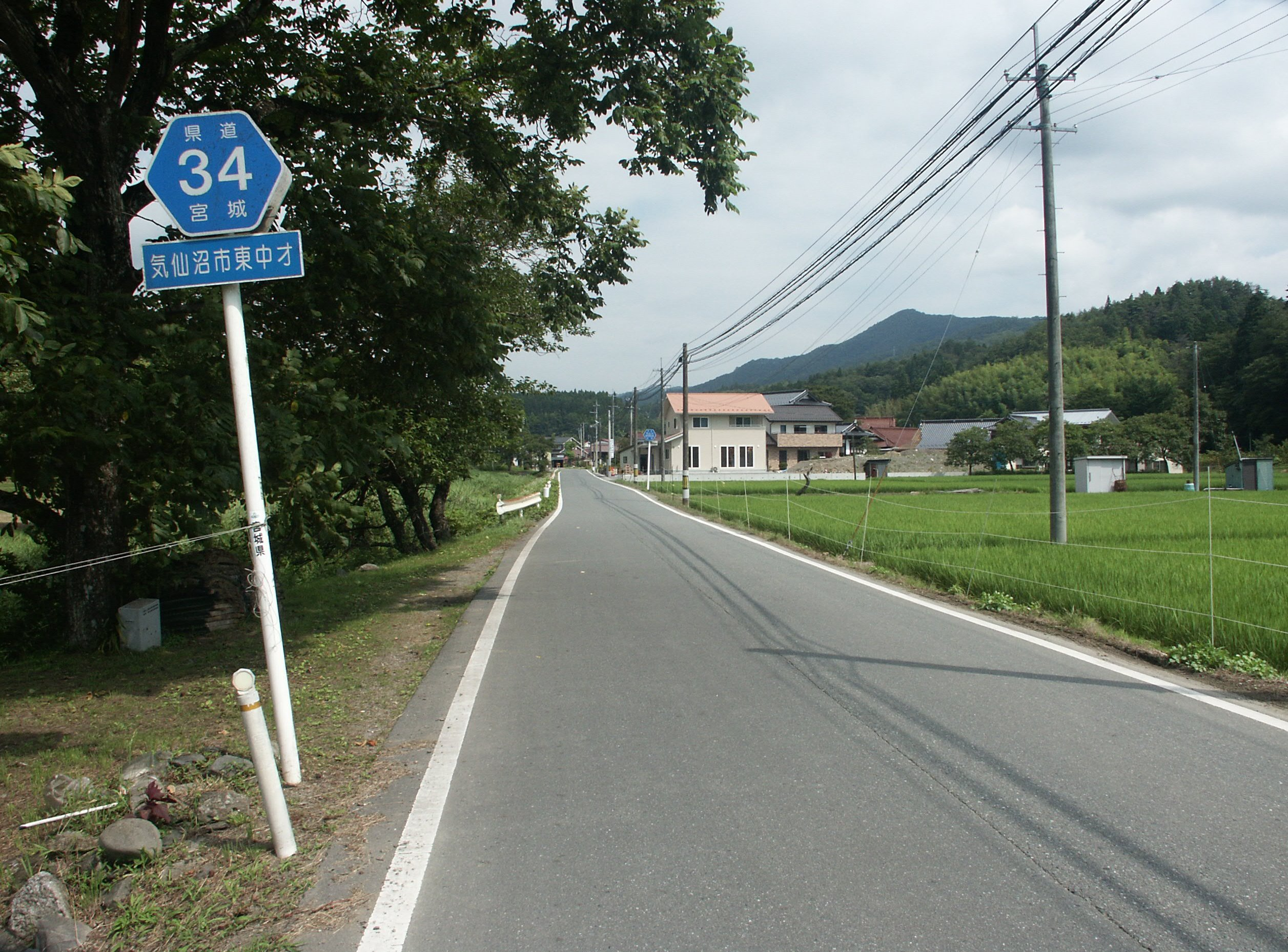 宮城県道34号線気仙沼市東中才付近